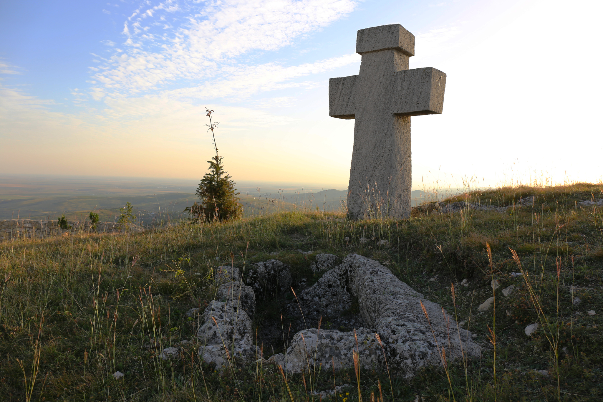 Situl arheologic de la Proșca